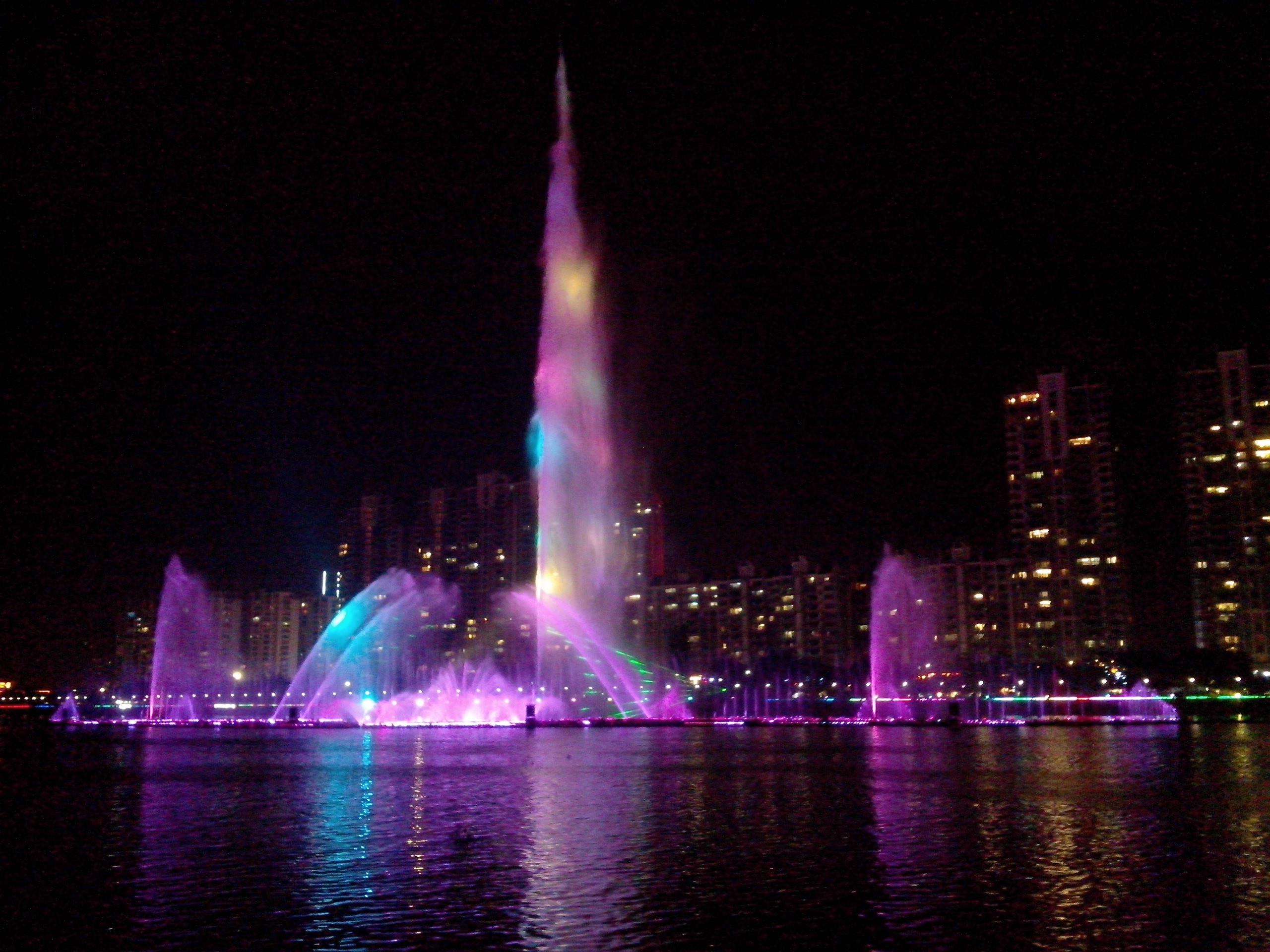 中文（中国大陆）: 广东省揭阳市榕江大型音乐喷泉 中文（台灣）: 廣東省揭陽市榕江大型音樂噴泉